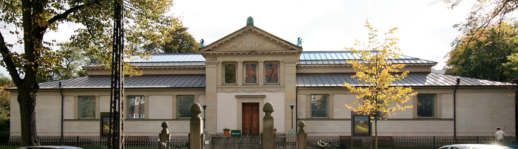 Den Hirschsprungske Samling, Østerbro, København. Bygget. 1910. Arkitekt: Hermann Baagøe Storck.